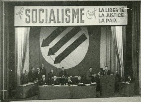 Congrès national extraordinaire de la SFIO tenu à Montrouge, les 29-31 mars 1946. Photo : NEWS SERVICE.